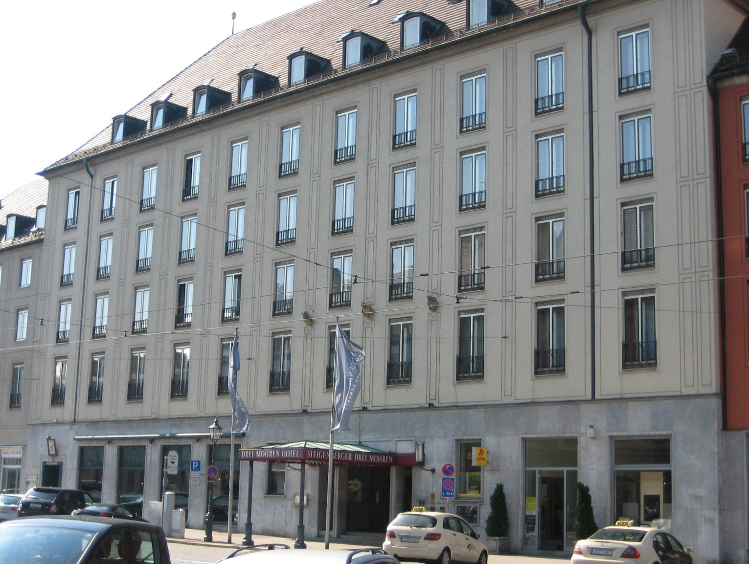 Hotel Drei Mohren in Augsburg; Fassade zur Maximilianstraße